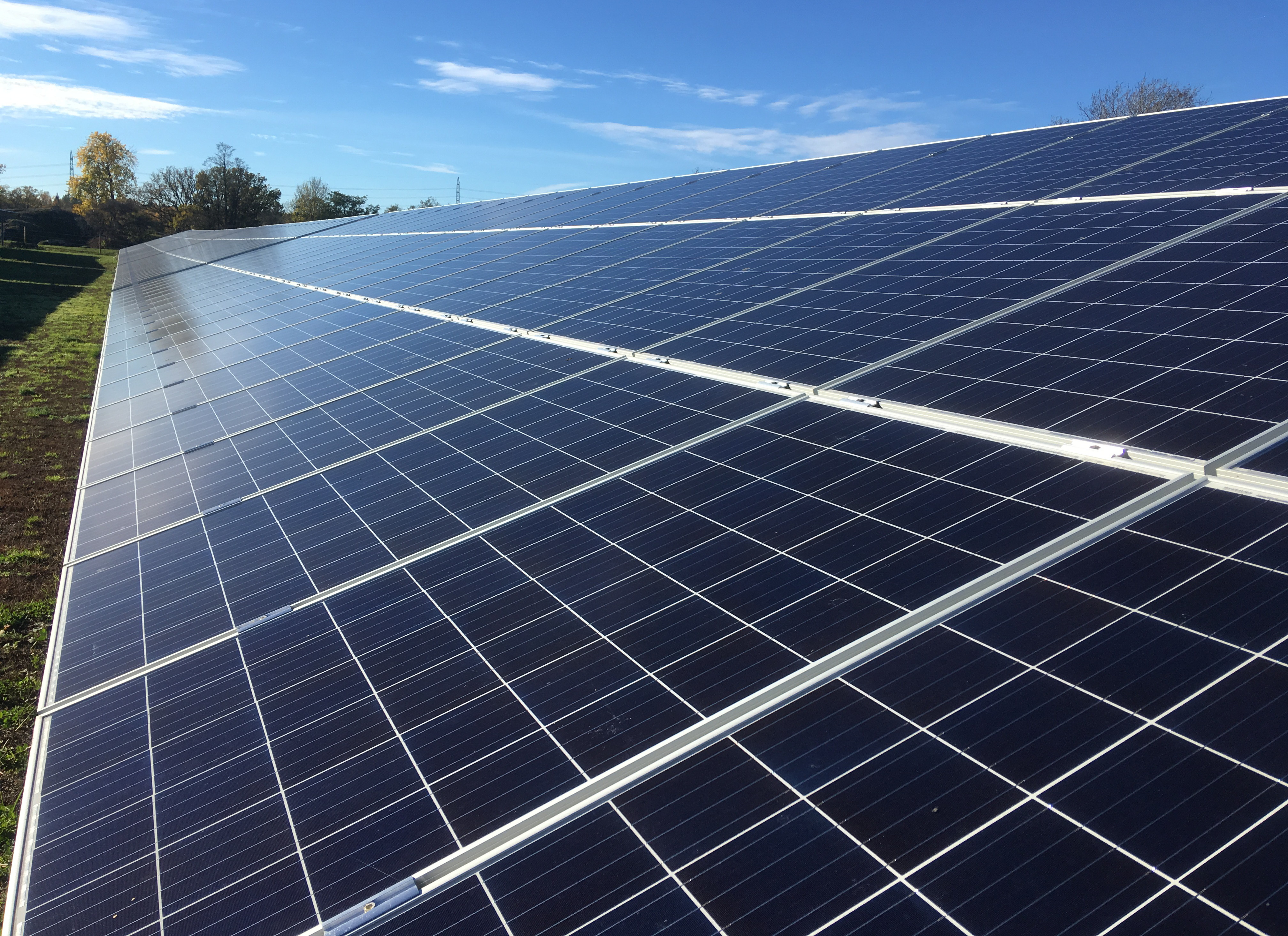 Ågesta solaranläggning i Huddinge kommun